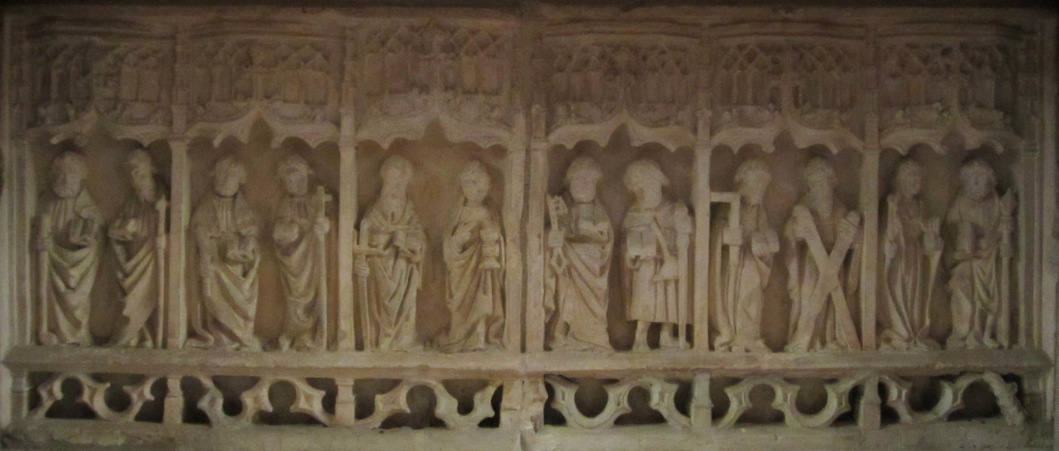 Village de Dignonville - Le retable des douze apôtres